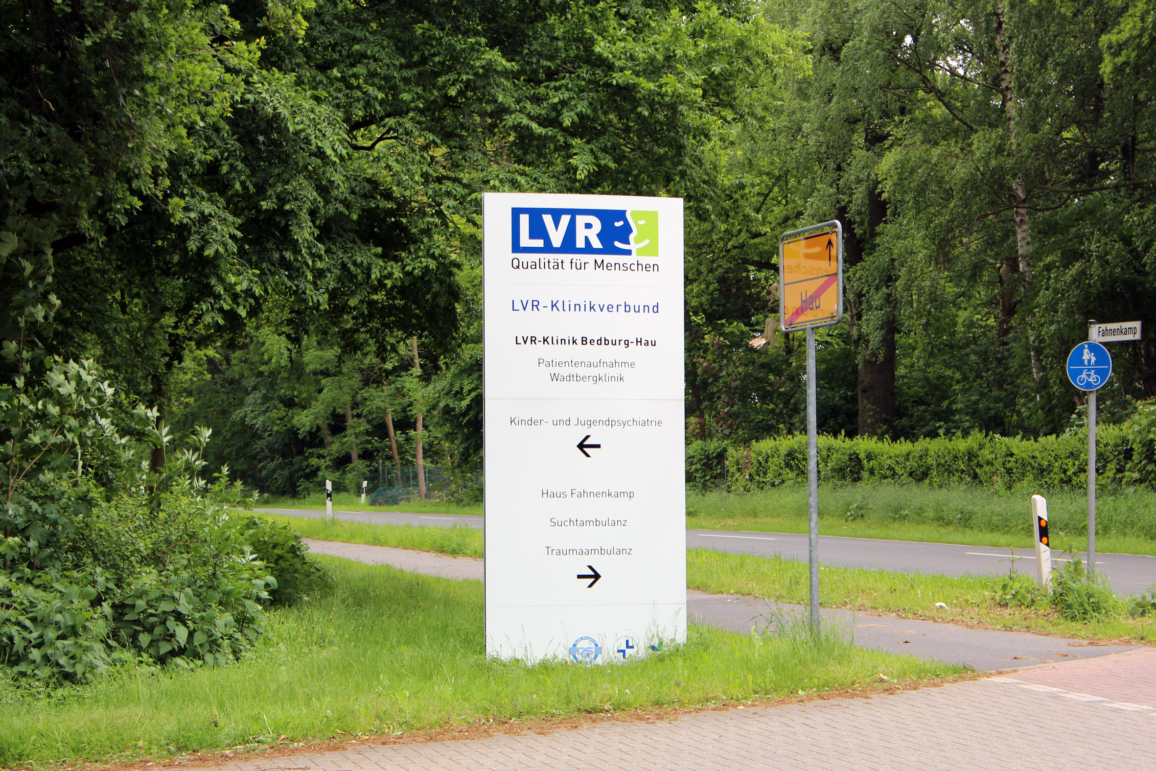 Schild an der Zufahrt zur LVR-Klinik Bedburg-Hau am Johann-van-Aken-Ring